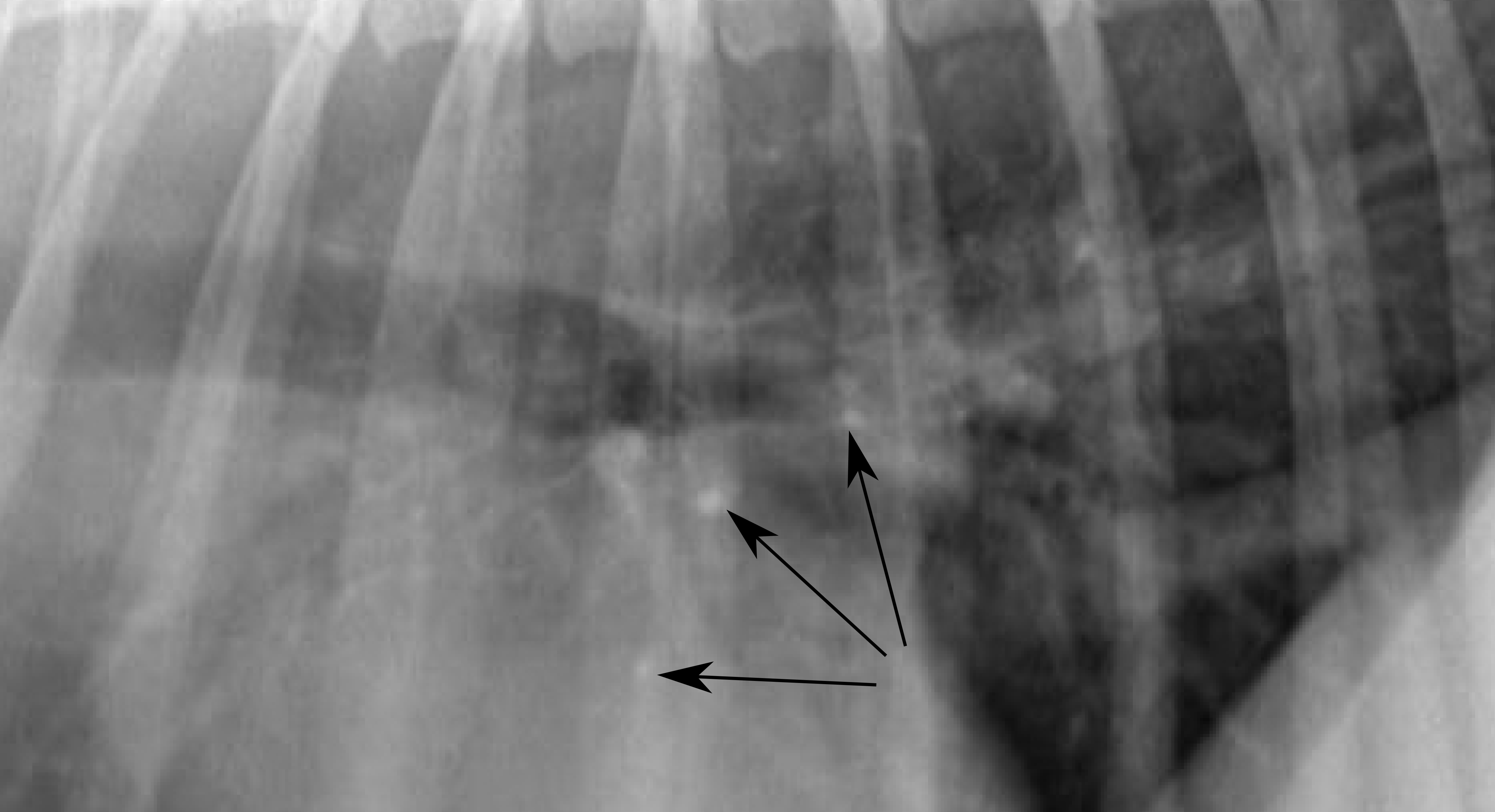 Pulmonale Osteome bei einem Hund